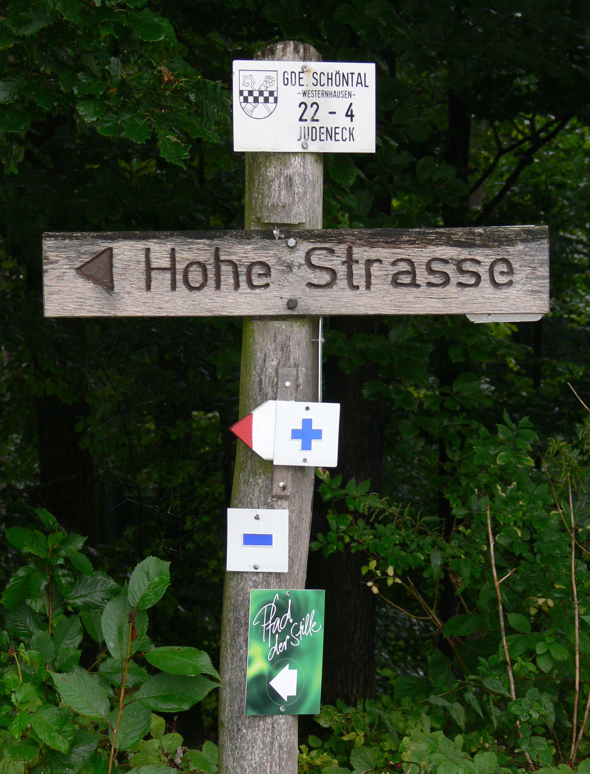 Hinweisschild an der Hohen Straße zwischen Kocher und Jagst bei Schöntal in Baden-Württemberg